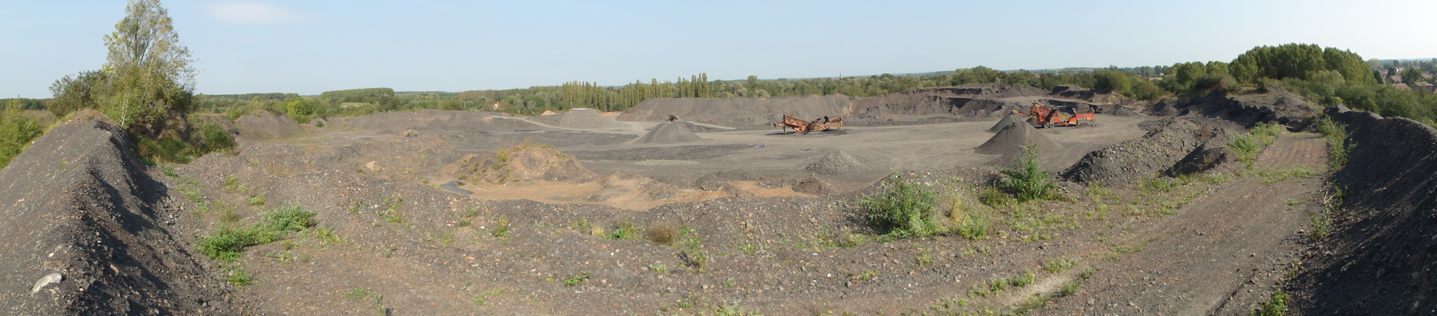 Terrils nos 201 et 202 respectivement dénommés Cuvinot et Cuvinot Ouest, Fosse Cuvinot de la Compagnie des mines d'Anzin, Onnaing, Nord, Nord-Pas-de-Calais, France.